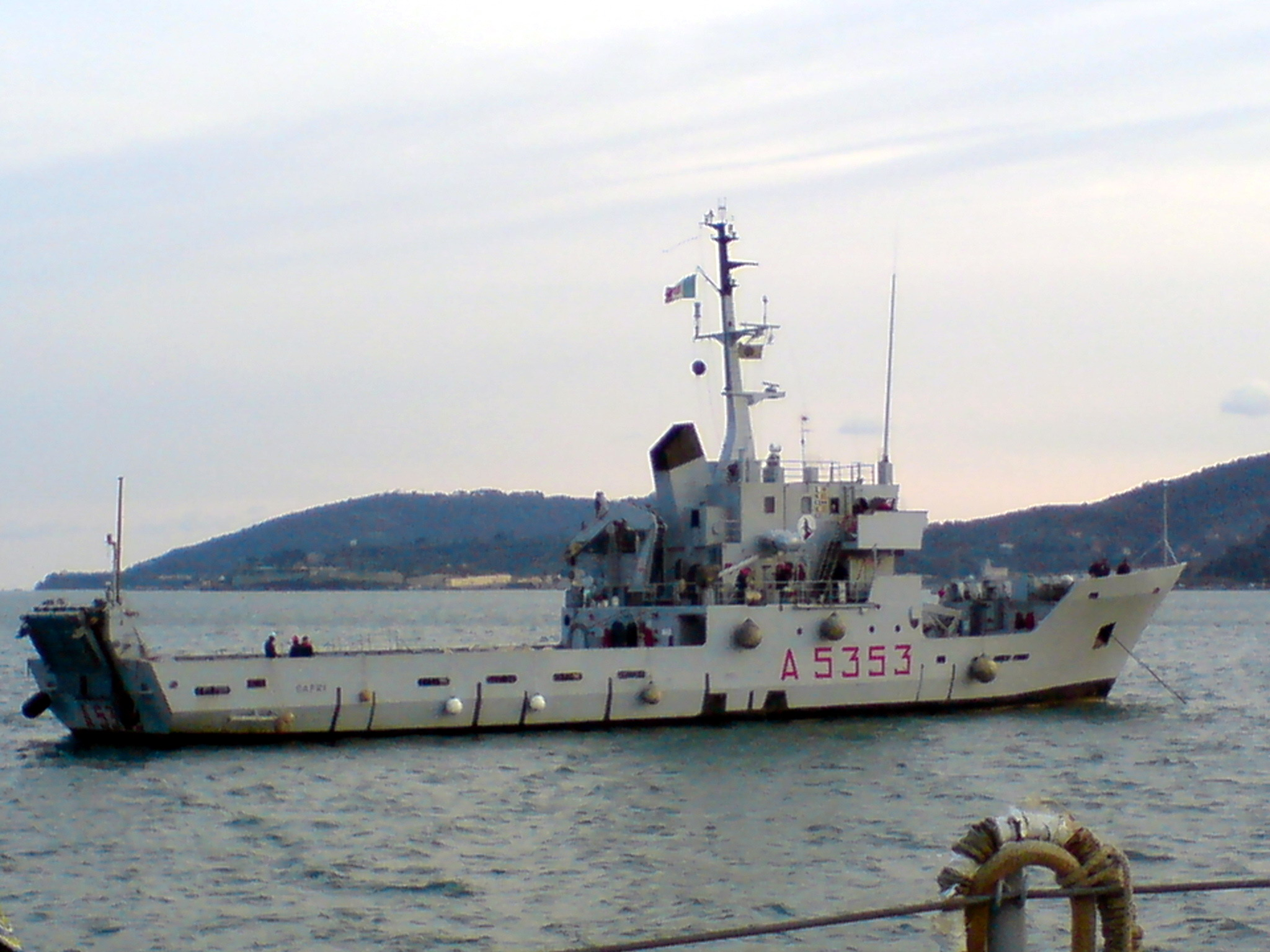 Nave trasporto costiero Capri